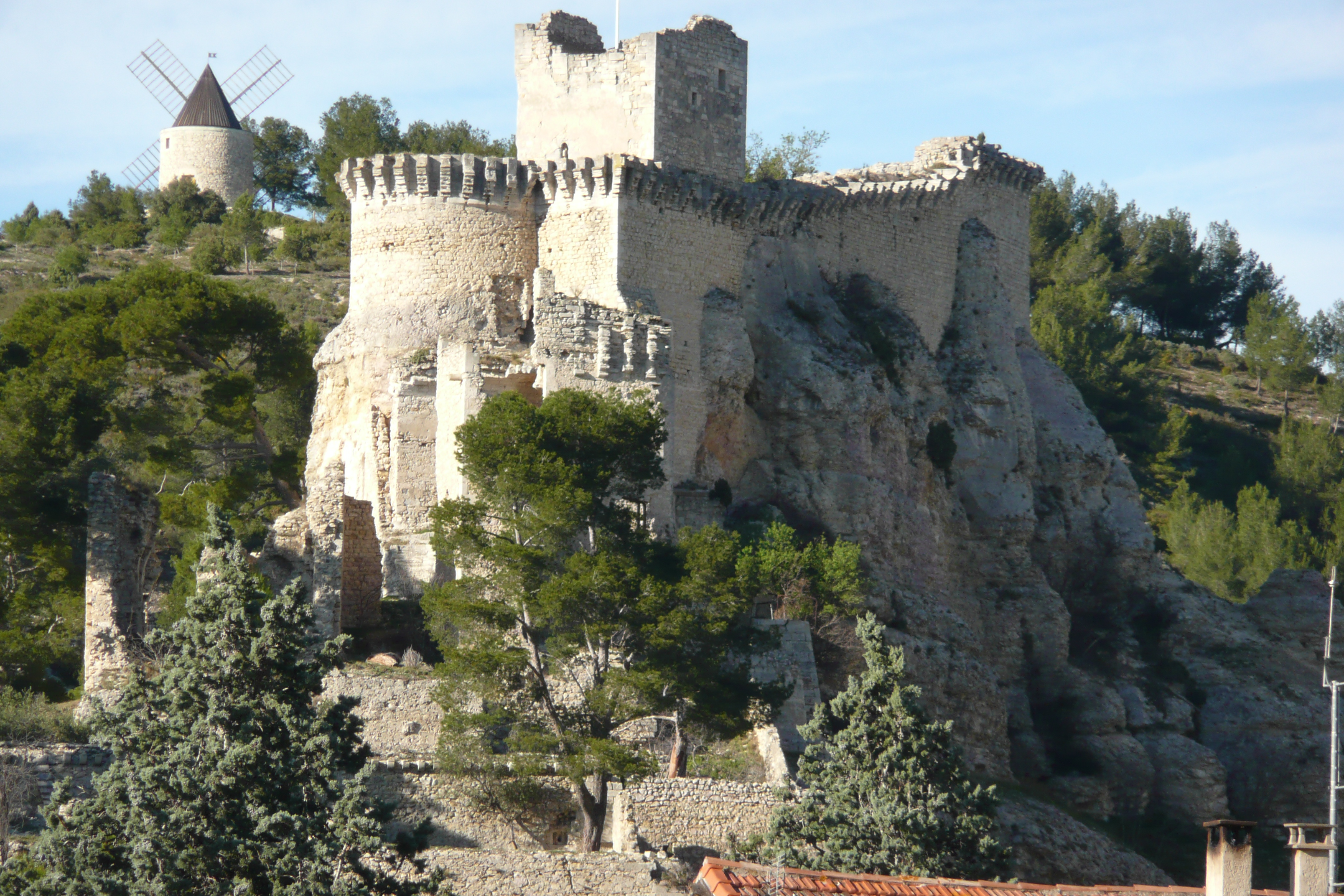 Chapelle Saint Marcellin et moulin Bonnet à Boulbon.